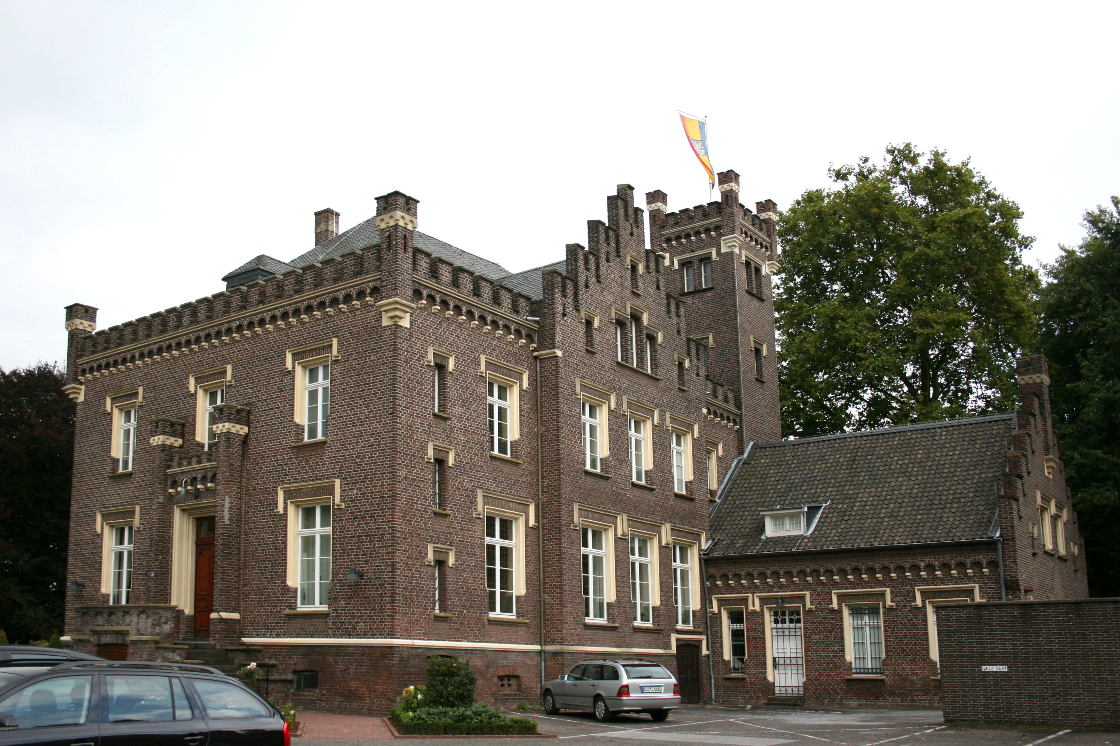 Rathaus in Geldern